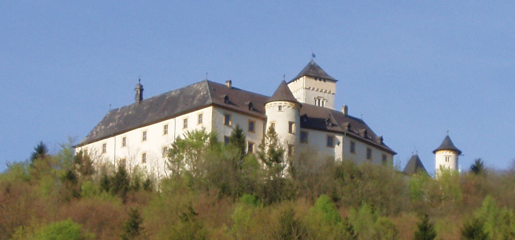 Schloss Greifenstein